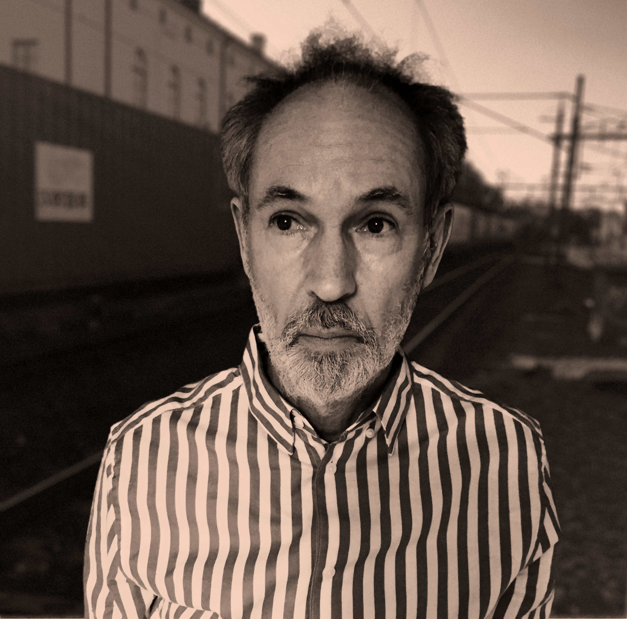 Stefano Foconi, svensk författare